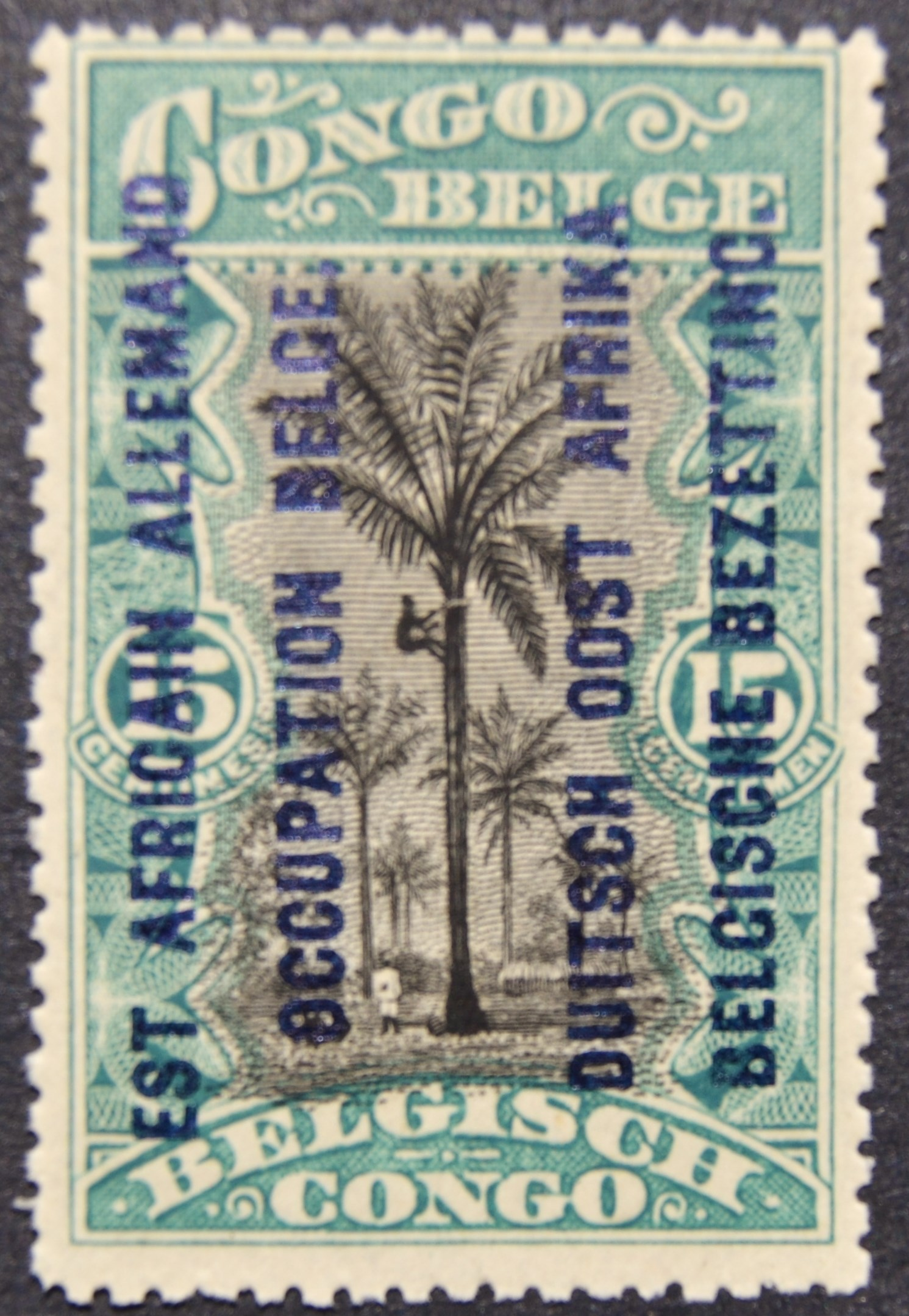 Selo com a inscrição EST AFRICAIN ALLEMAND OCCUPATION BELGE, sobre selo do Congo Belga.